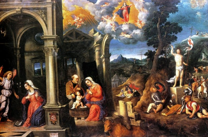 Paris Bordone - Sacri Misteri anno:1551 olio su tavola - 86,5 x 129 cm Duomo di Treviso